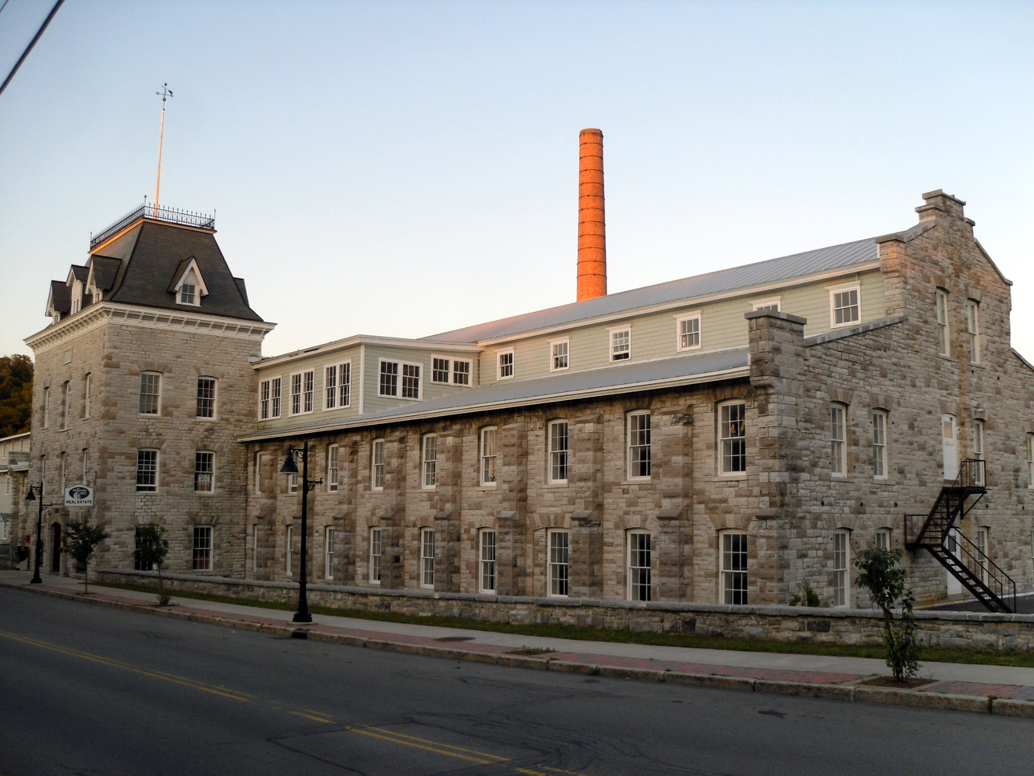 Dolgeville, New York